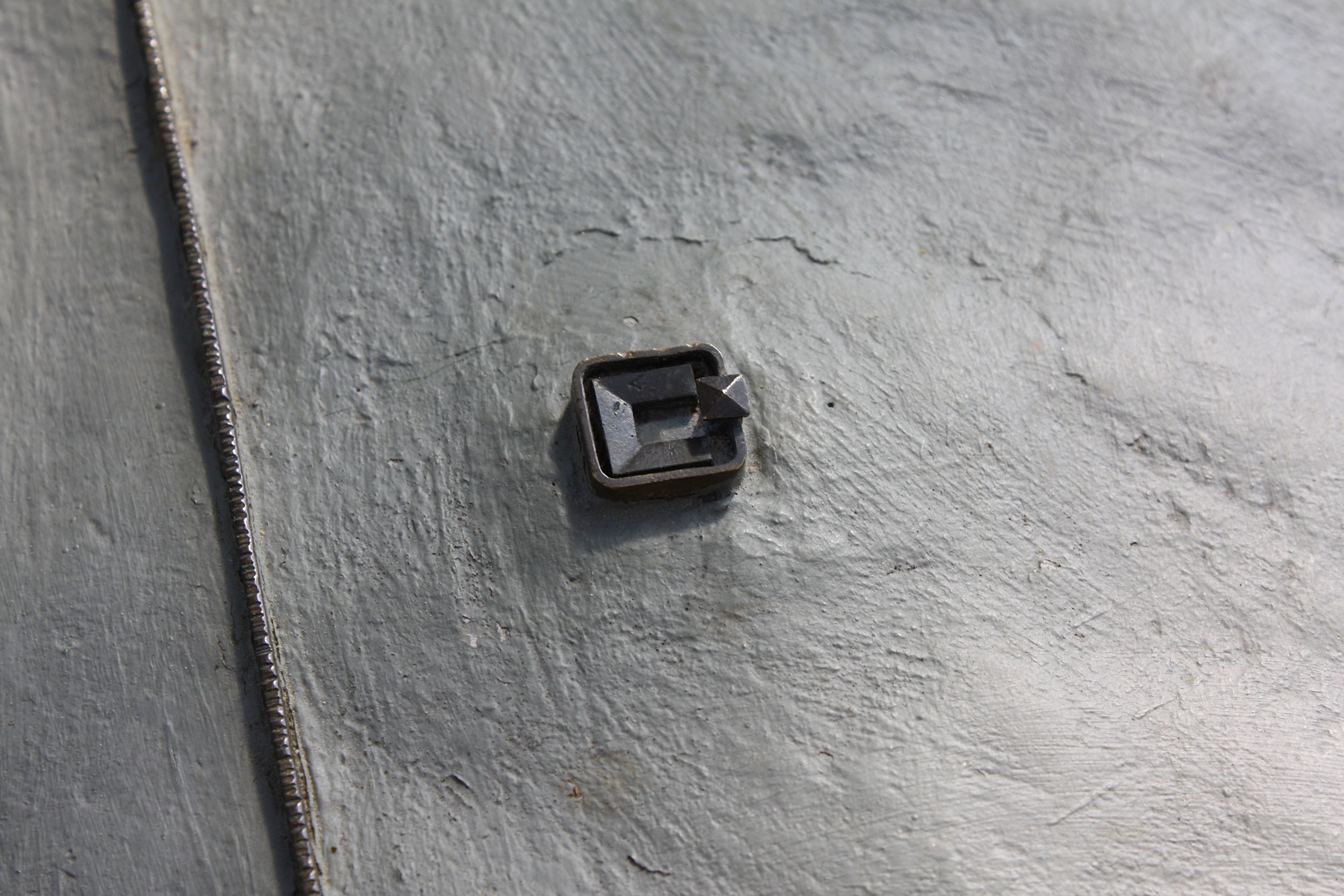 Rekonstruktionsversuch des Kleinkastells Kleindeinbach mit einem Landschaftsmodell bei Schwäbisch Gmünd (Standort: Eingang Rotenbachtal), mit Limes am linken Bildrand